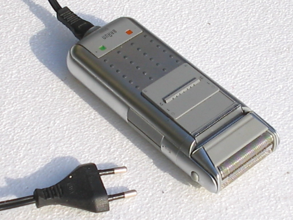 Elektrorasierer von Braun